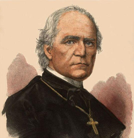 Bispo Wilhelm Emmanuel von Ketteler. Gravura animada a partir de fotografia, Mainz, 1865, Alemanha